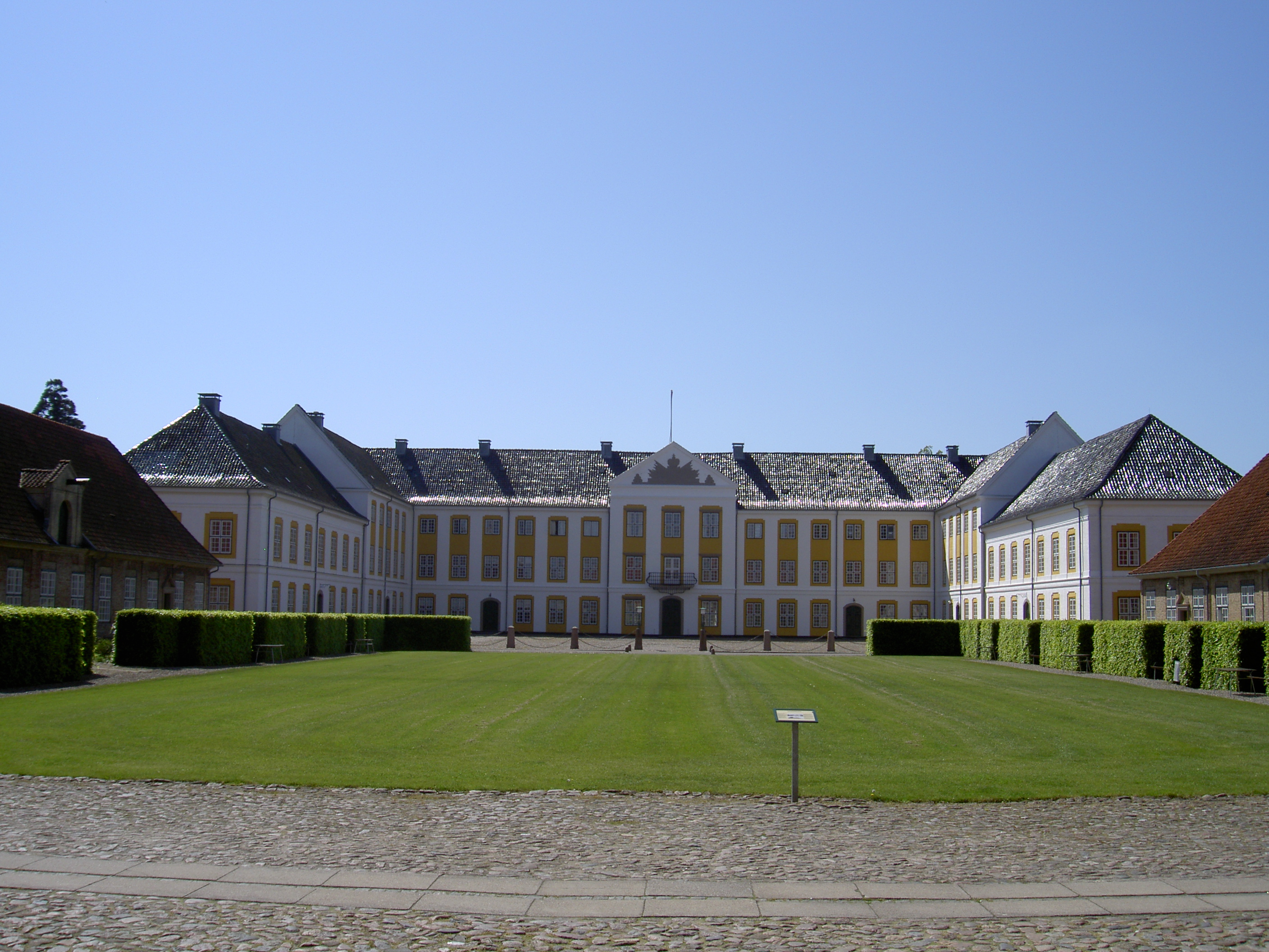 Schloss Augustenburg